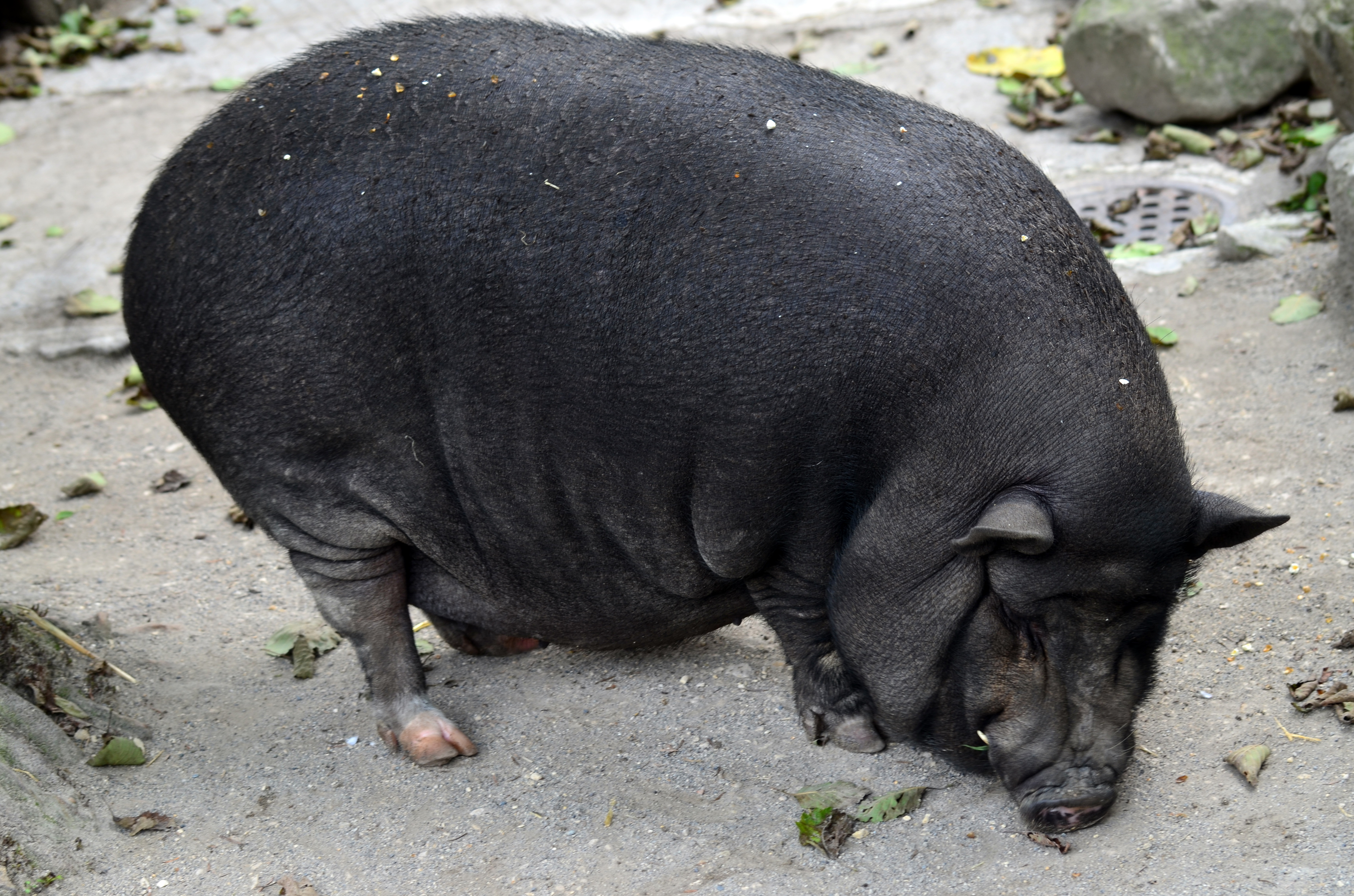 Knie's Kinderzoo in Rapperswil (Switzerland)